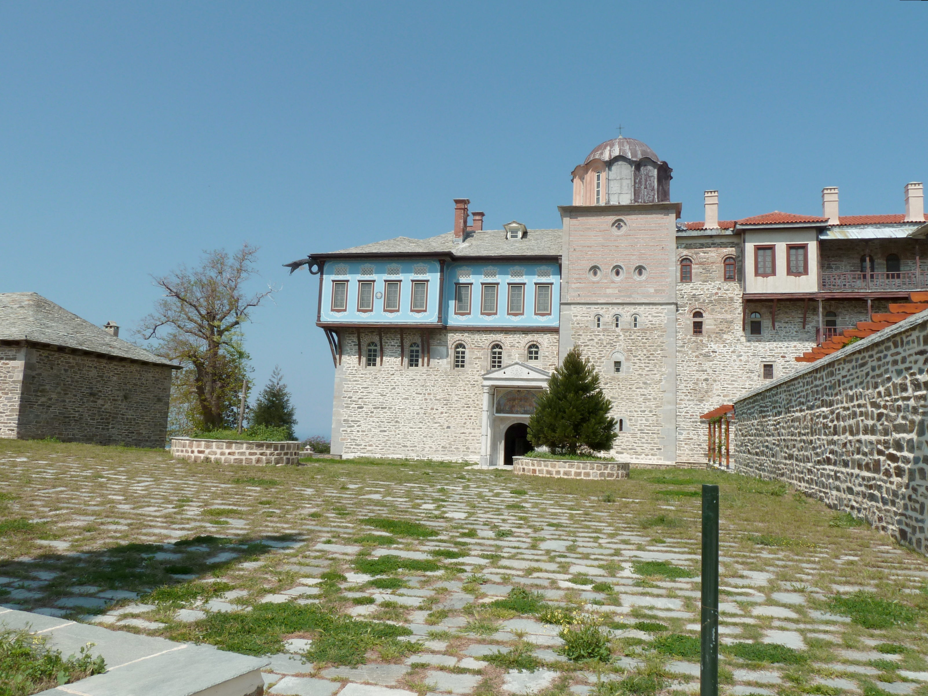 Entrée du monastère de Xeropotamou (Mont Athos)